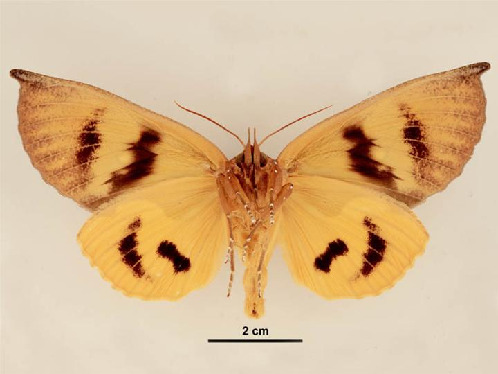 Eudocima aurantia female, ventral view